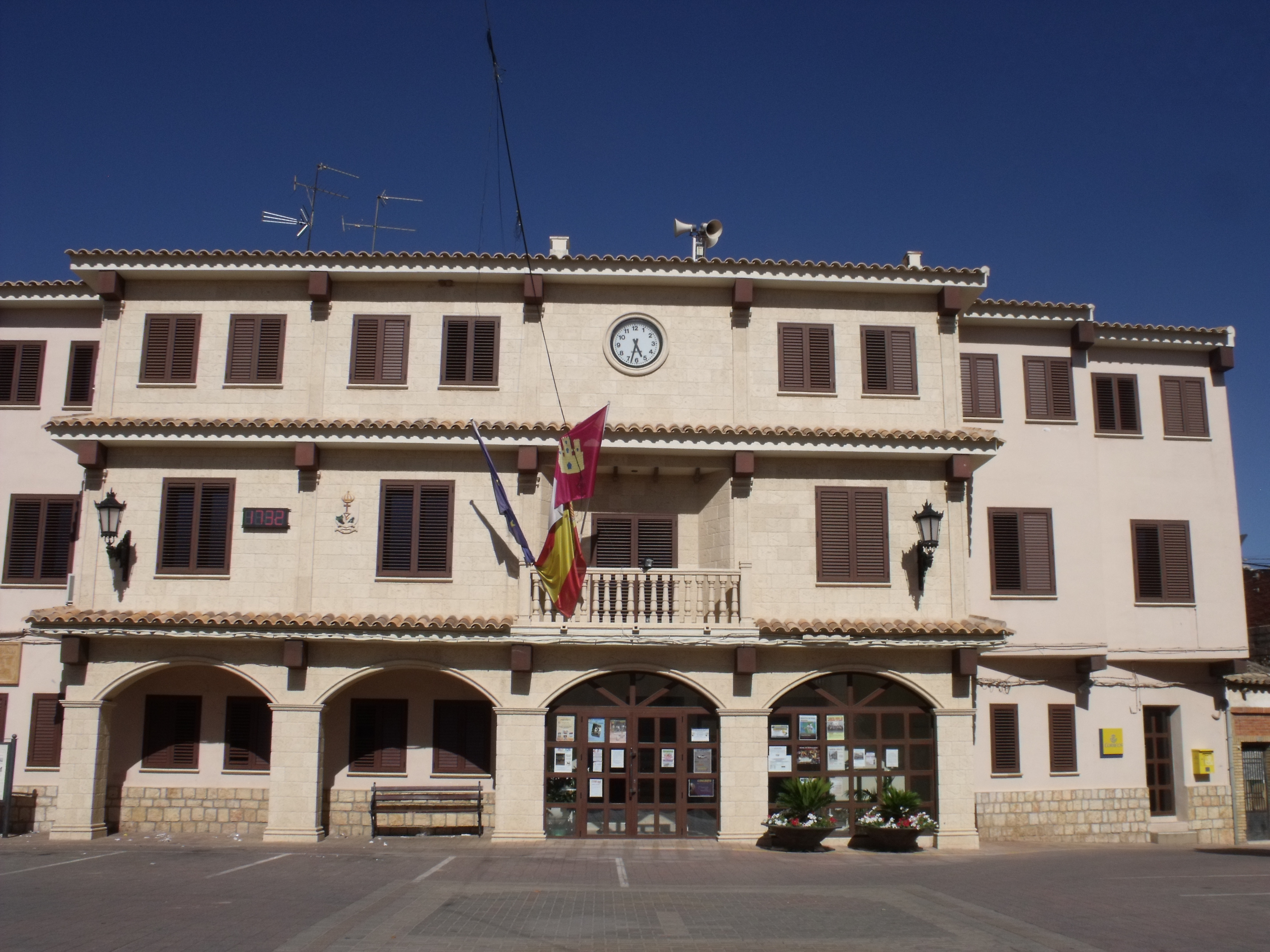 Ayuntamiento